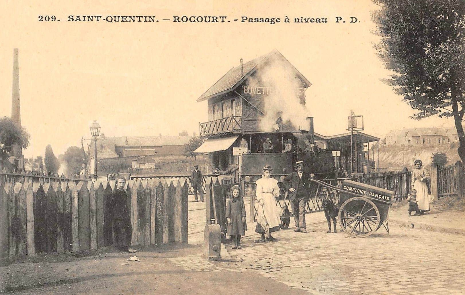 Le gare de Rocourt vers 1910.